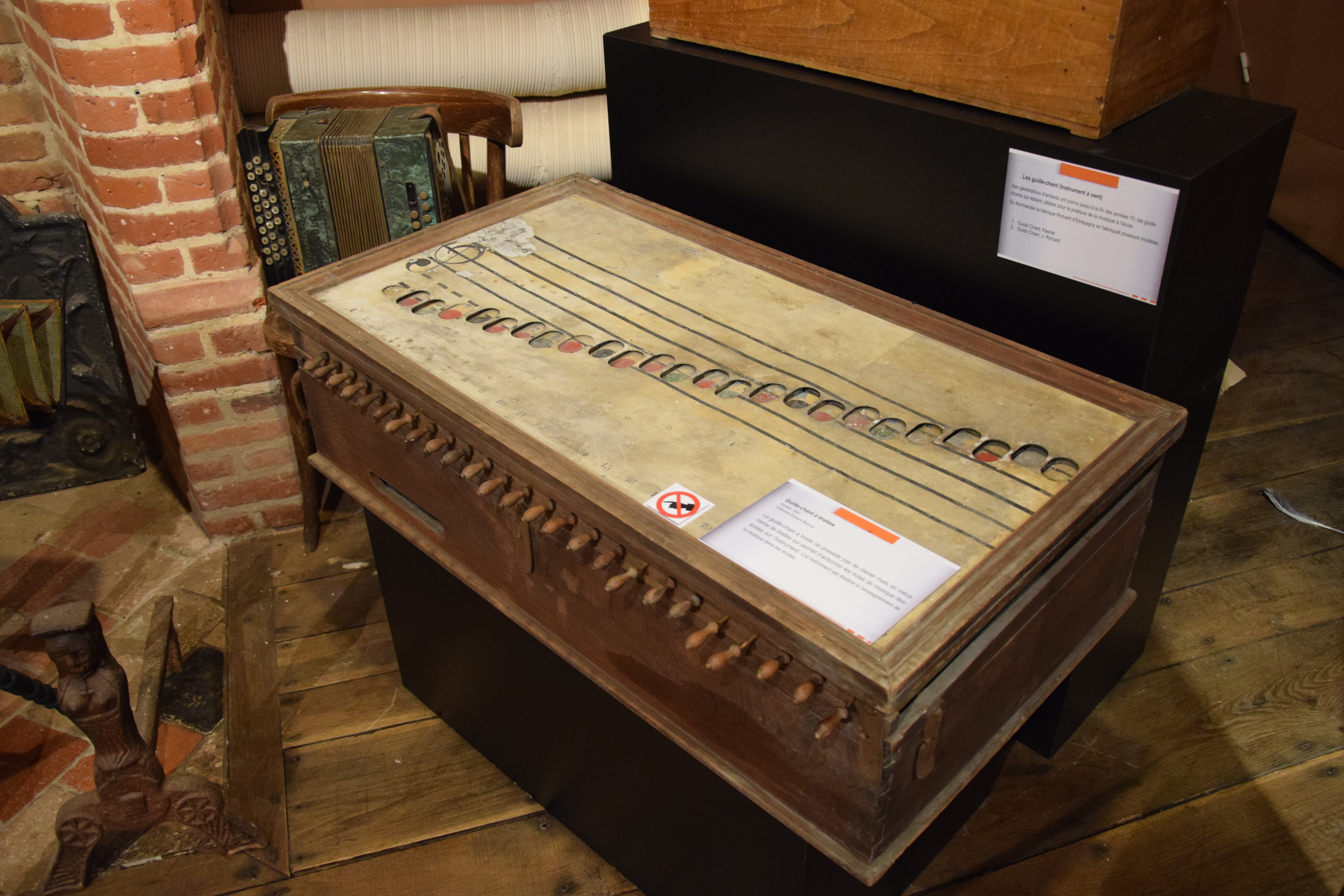 Château de Martainville